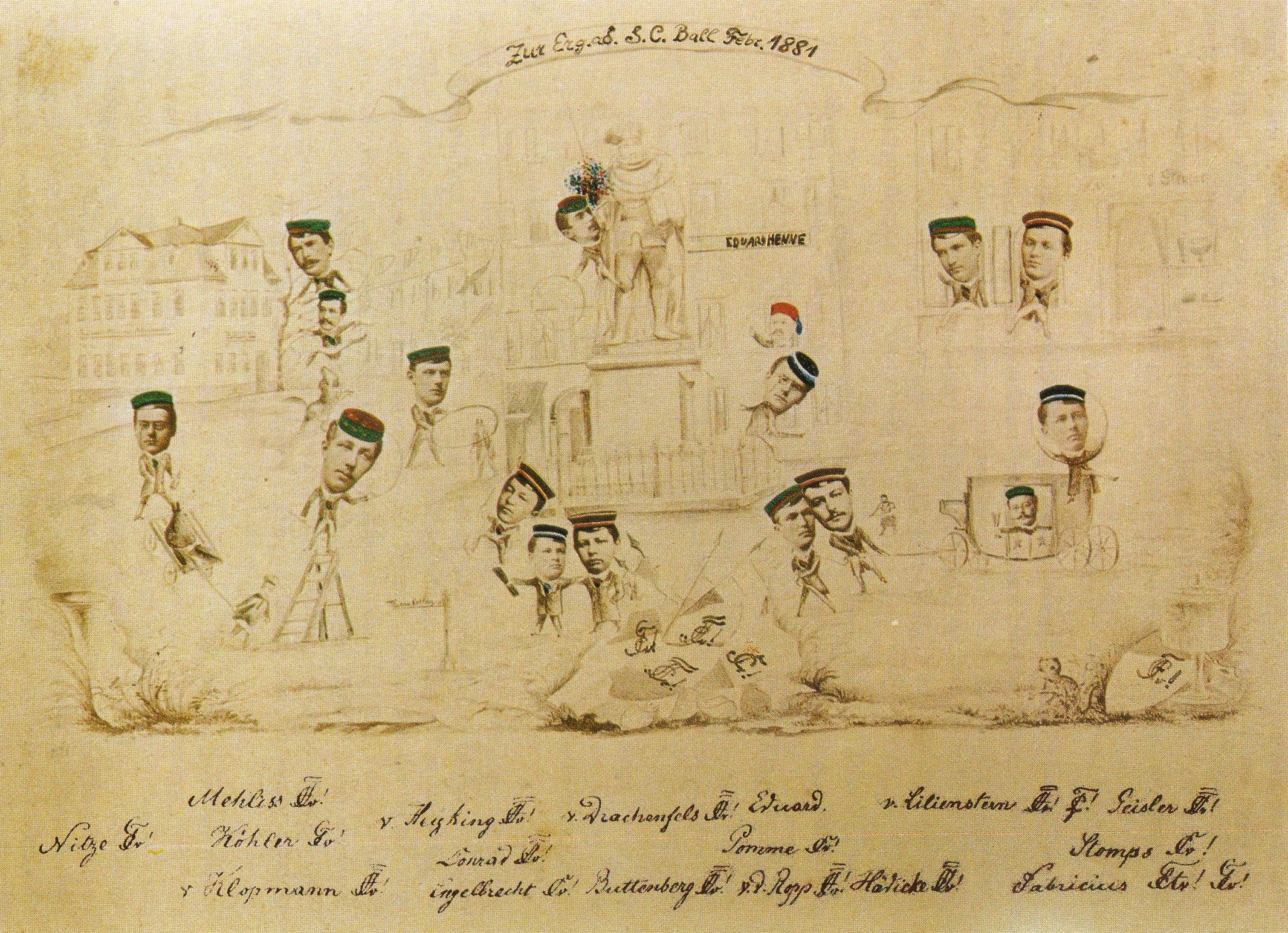 Collage mit Porträtfotografien von Jenaer Studenten zur Erinnerung an den Exbummel nach dem SC-Ball 1881